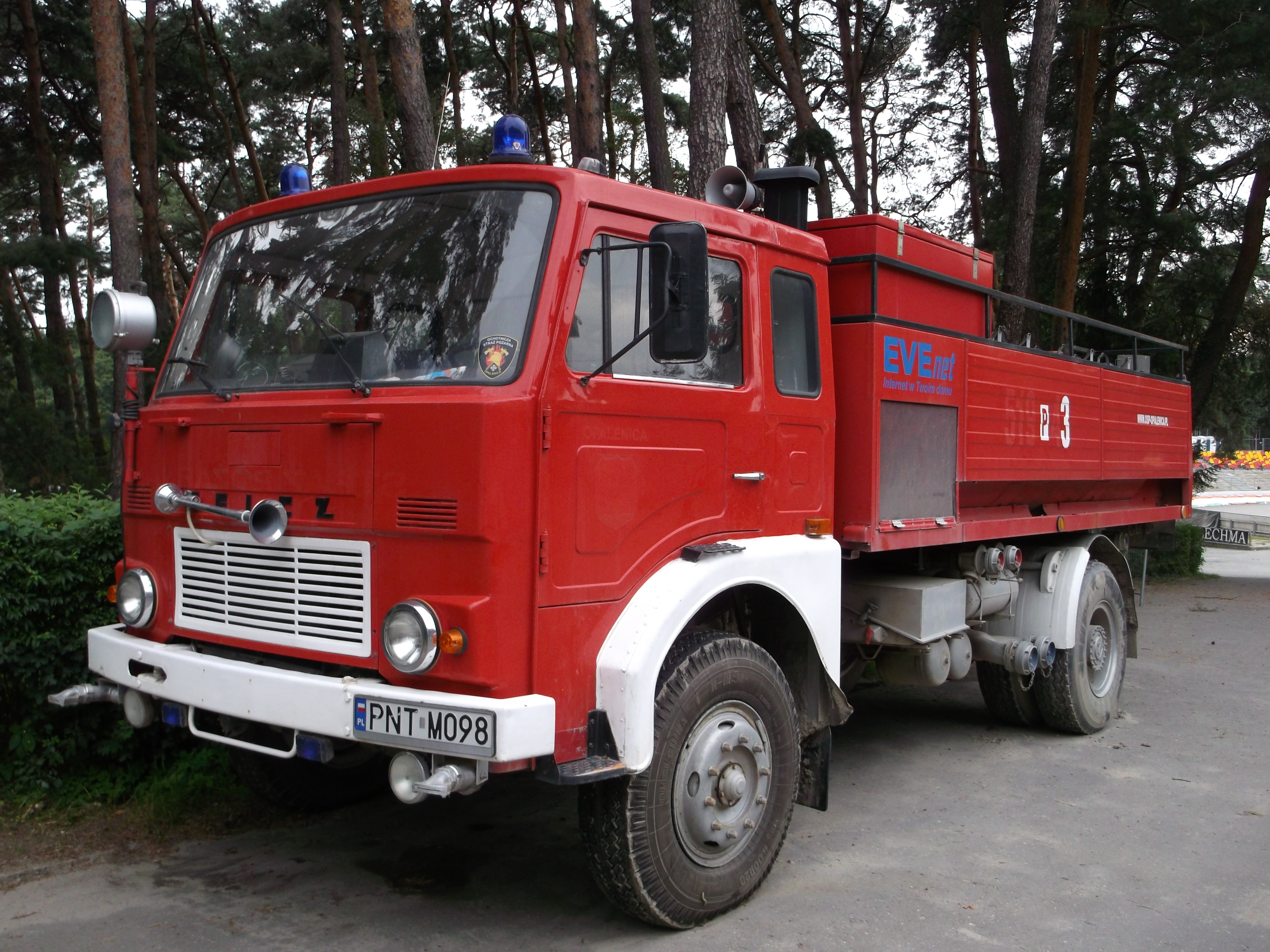 Pojazd straży pożarnej Jelcz 004 z OSP Opalenica na stadionie Golęcin w Poznaniu.